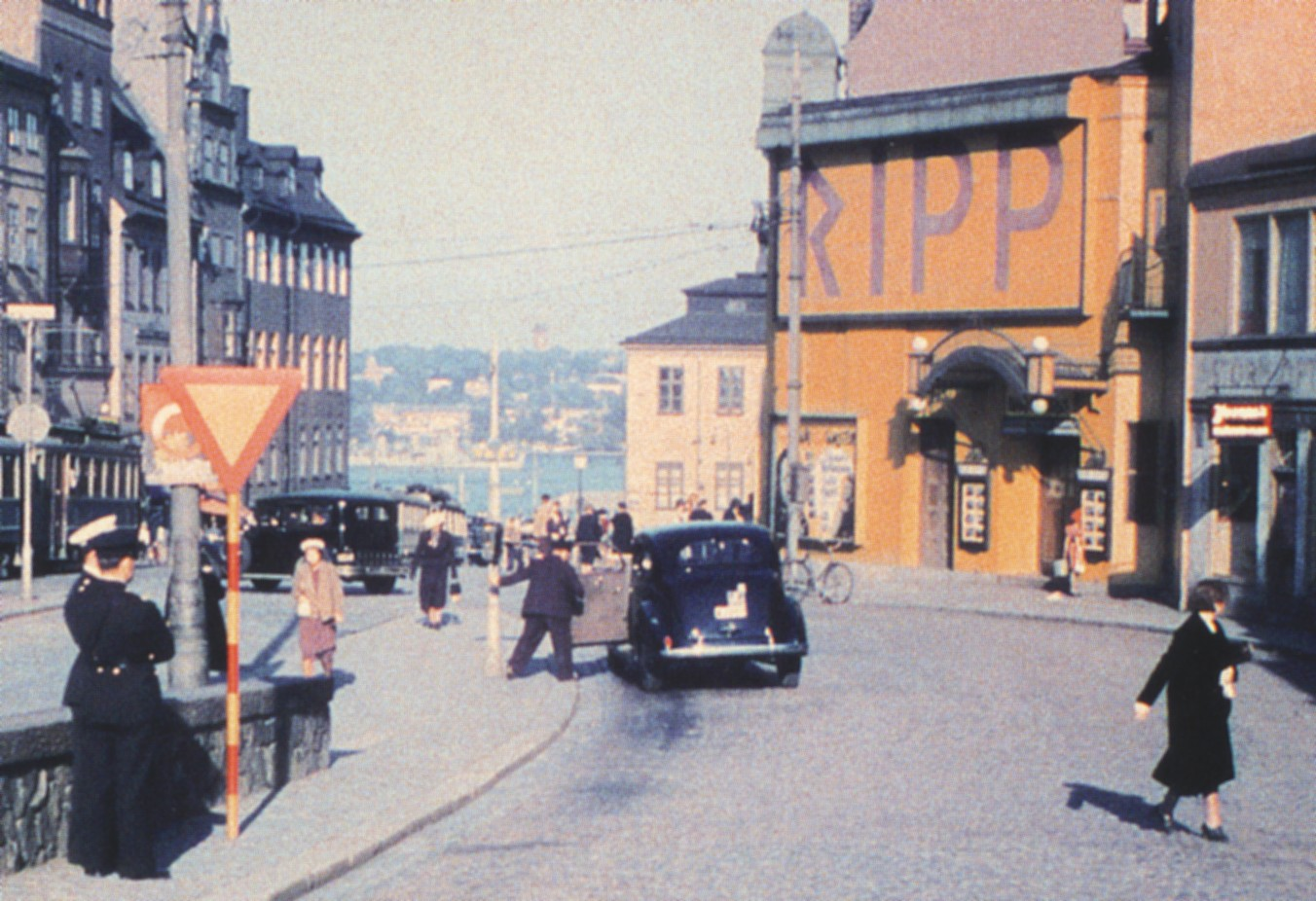 Hornsgatan i Stockholm österut med biografen "Ripp"